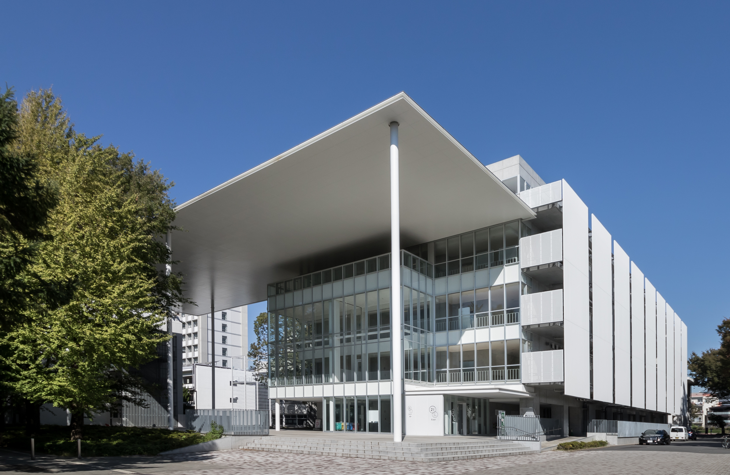 東京大学駒場キャンパス、21 Komaba Center for Educational Excellence（21 KOMCEE）。